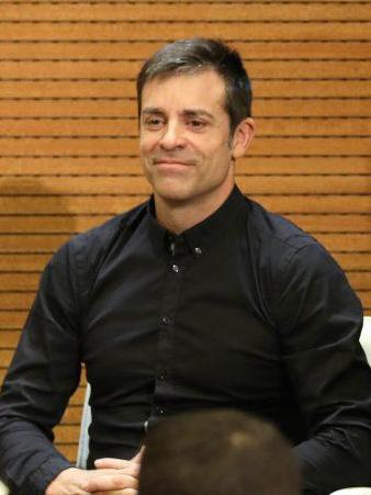 Reciclar más y mejor los envases del vidrio, y concienciar a la ciudadanía de la importancia y beneficios de dar otra vida a este material son los objetivos de la iniciativa ‘Competición entre distritos’, que ha presentado hoy la delegada de Medio Ambiente y Movilidad, Inés Sabanés.